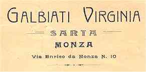 Monza carta intestata Virginia Galbiati - sarta in Monza in via Enrico da Monza n.10